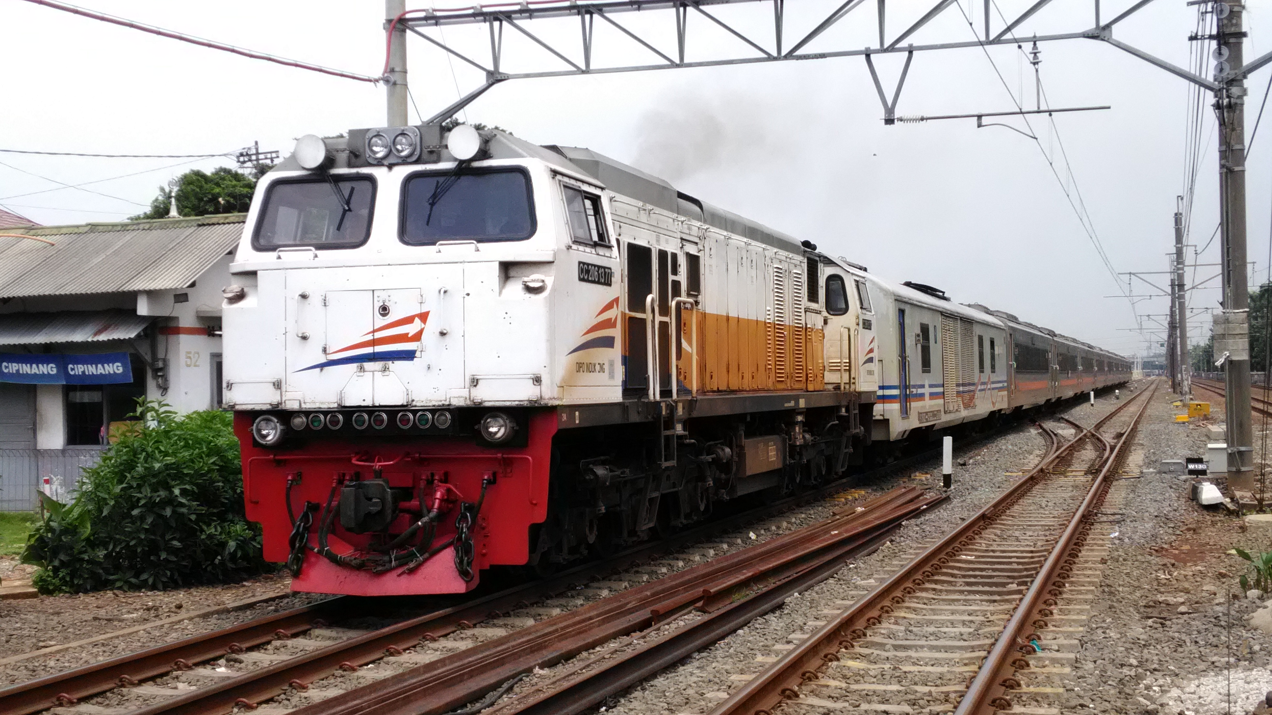 Sunda: KA Mutiara Selatan liwatan Cipinang nuju ka Stasion Jatinegara